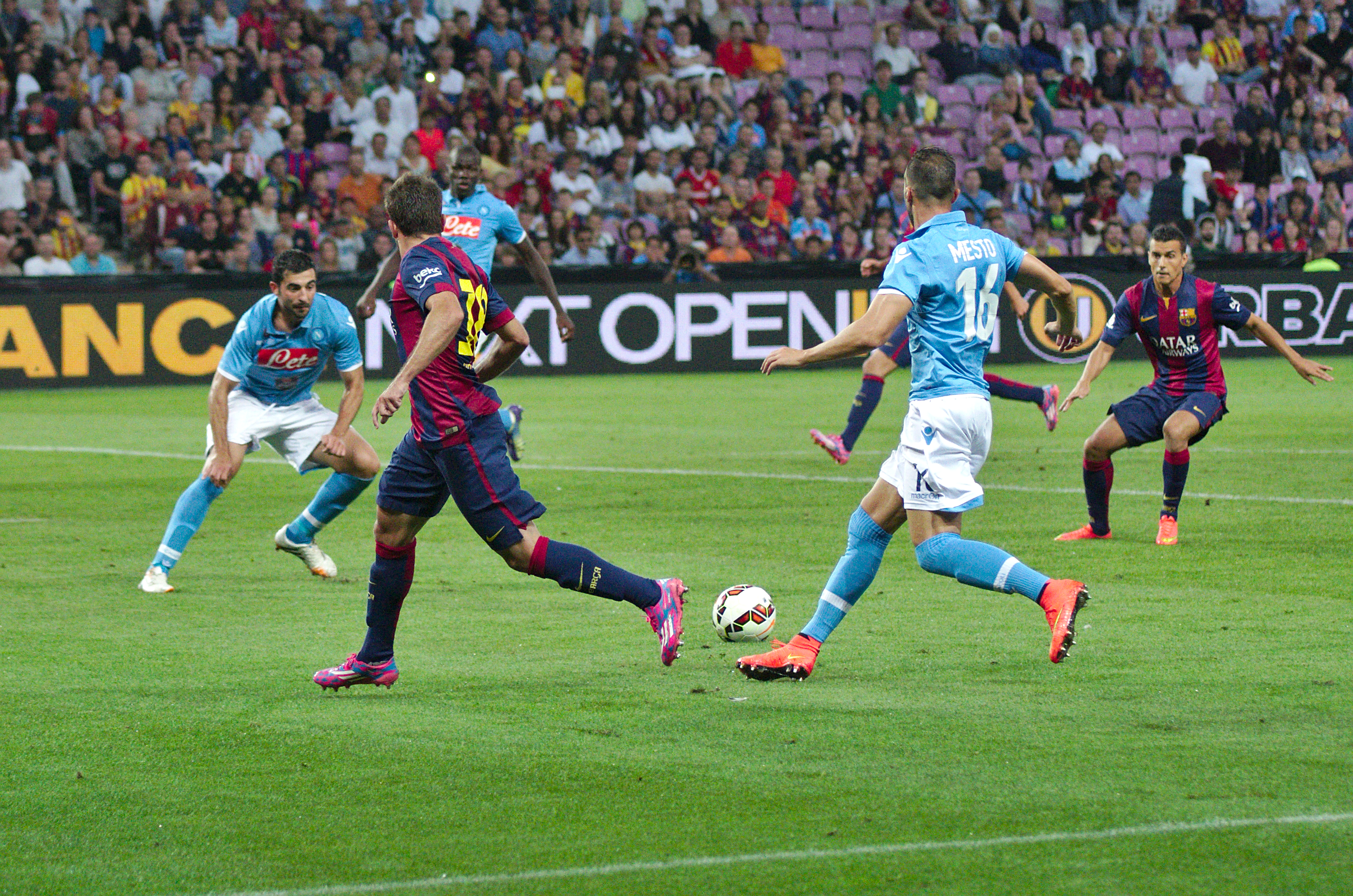 Barça - Napoli - 20140806